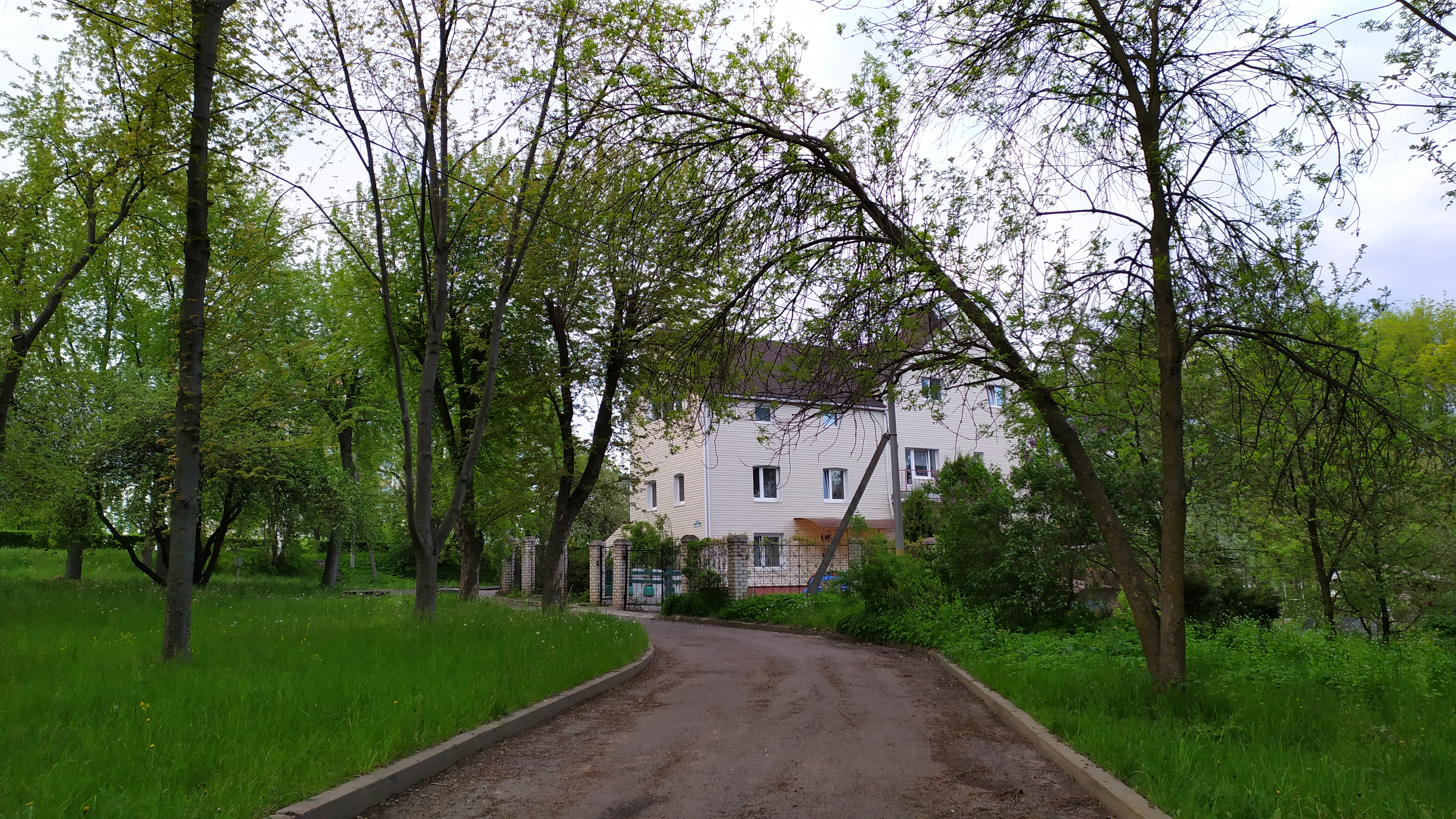 Раён вёскі Грэбелька, цяпер у межах горада Менска.